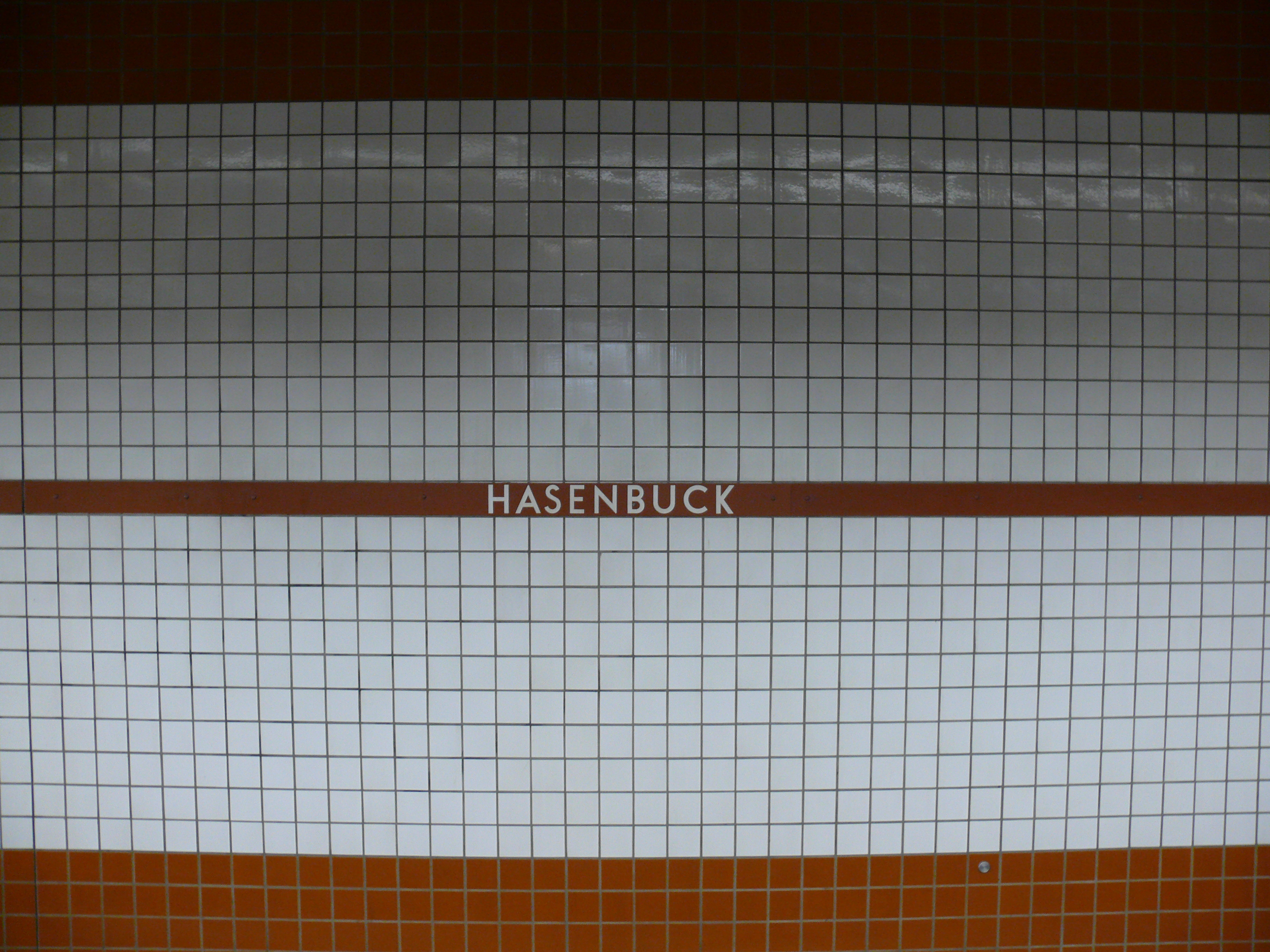 Stationsname an den Bahnsteigwänden am U-Bahnhof Hasenbuck in Nürnberg.